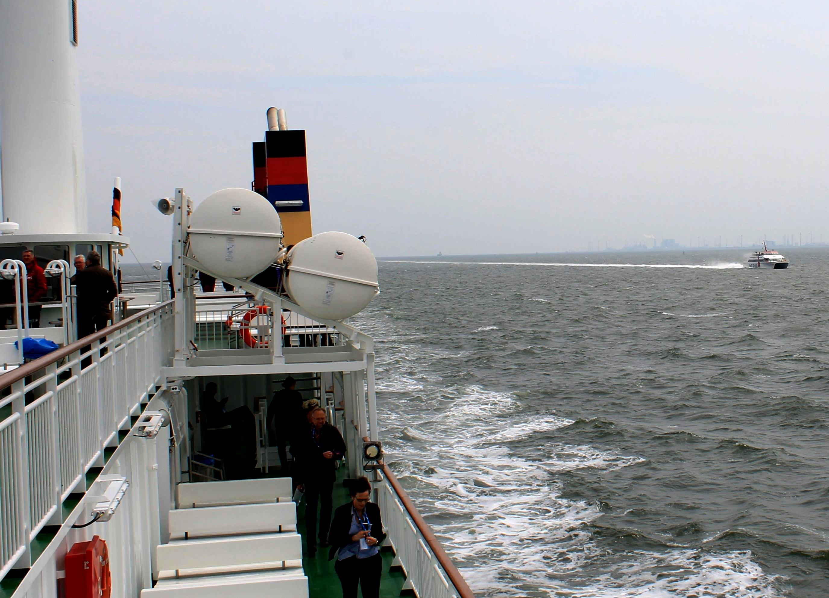 Die Ostfriesland wird vom Katamaran Nordlicht überholt